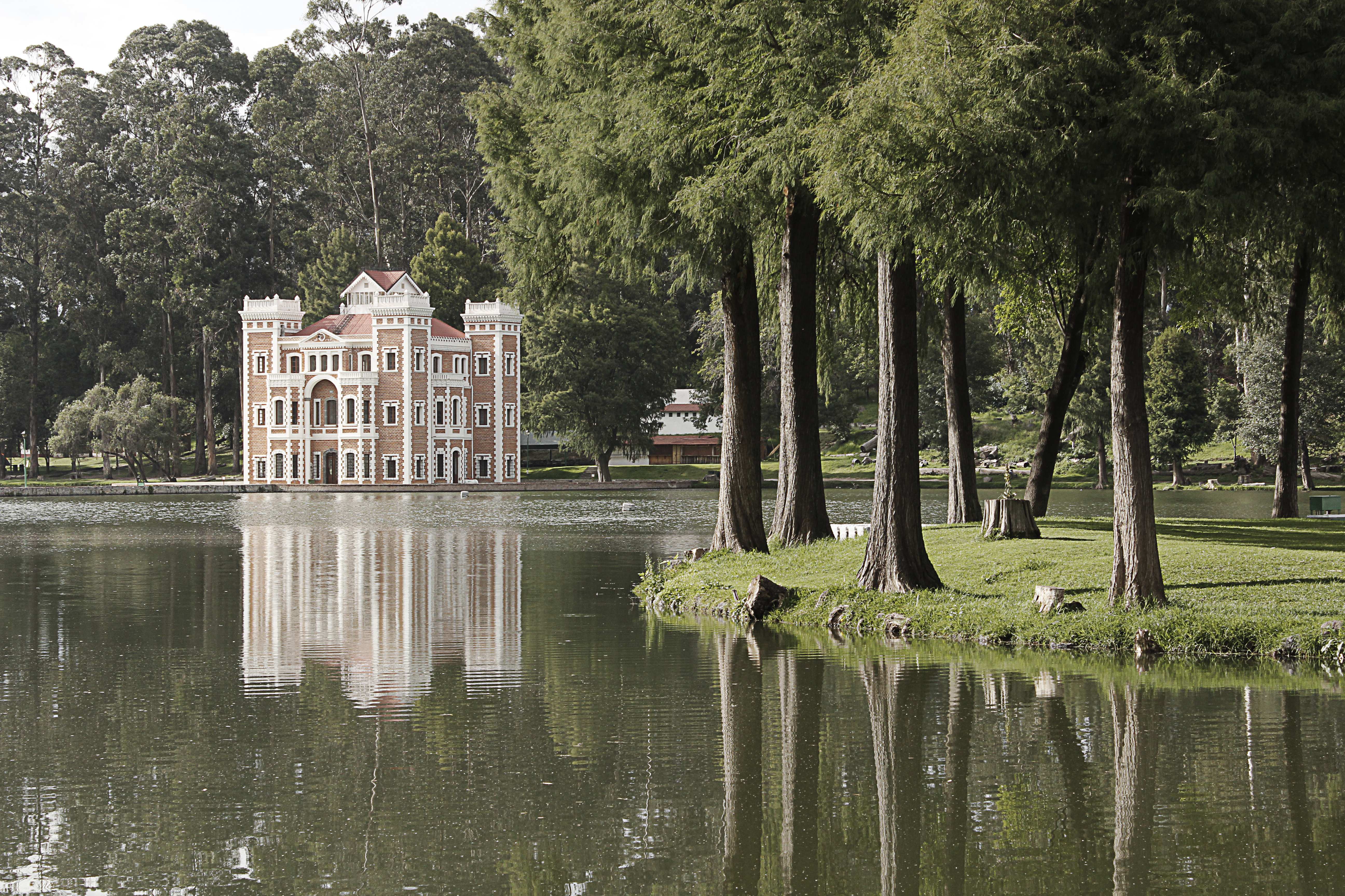 Ex Hacienda de Chautla , Puebla.